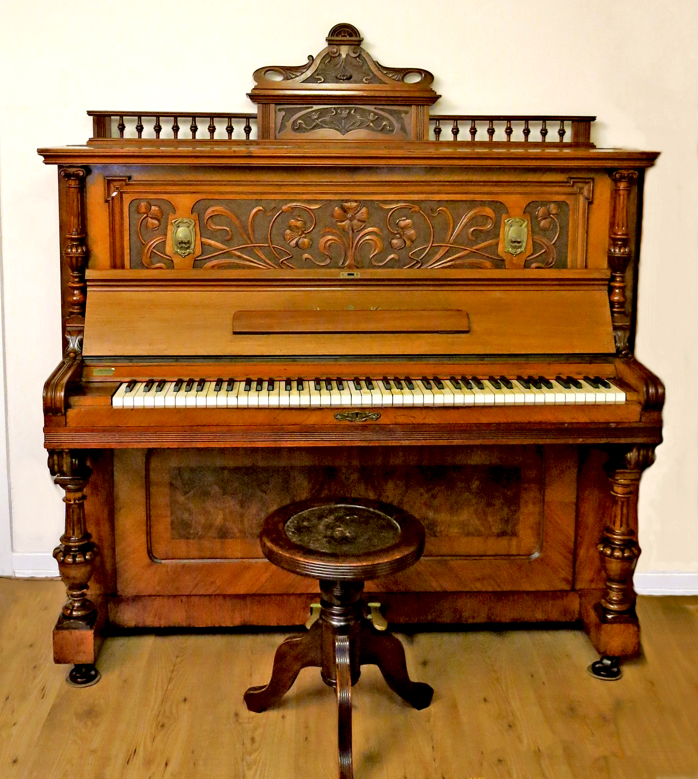 Klavier aus der Grossh. Sächs. Hof Pianoforte Fabrik, gebaut von Willi Ritter 1900 in der Firma seines Vater Carl Richard Ritter und Drehhocker (Klavierhocker).